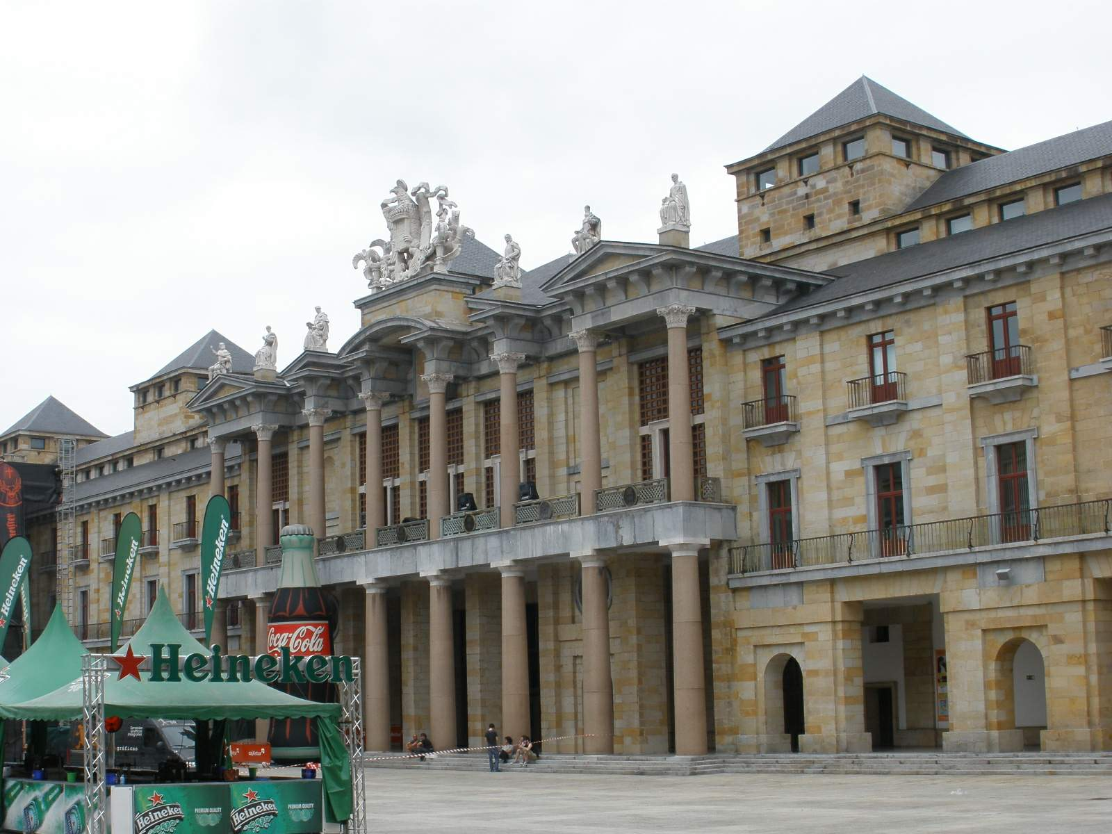 Gijón - Plaza de la Laboral Ciudad de la Cultura (ex Universidad Laboral)